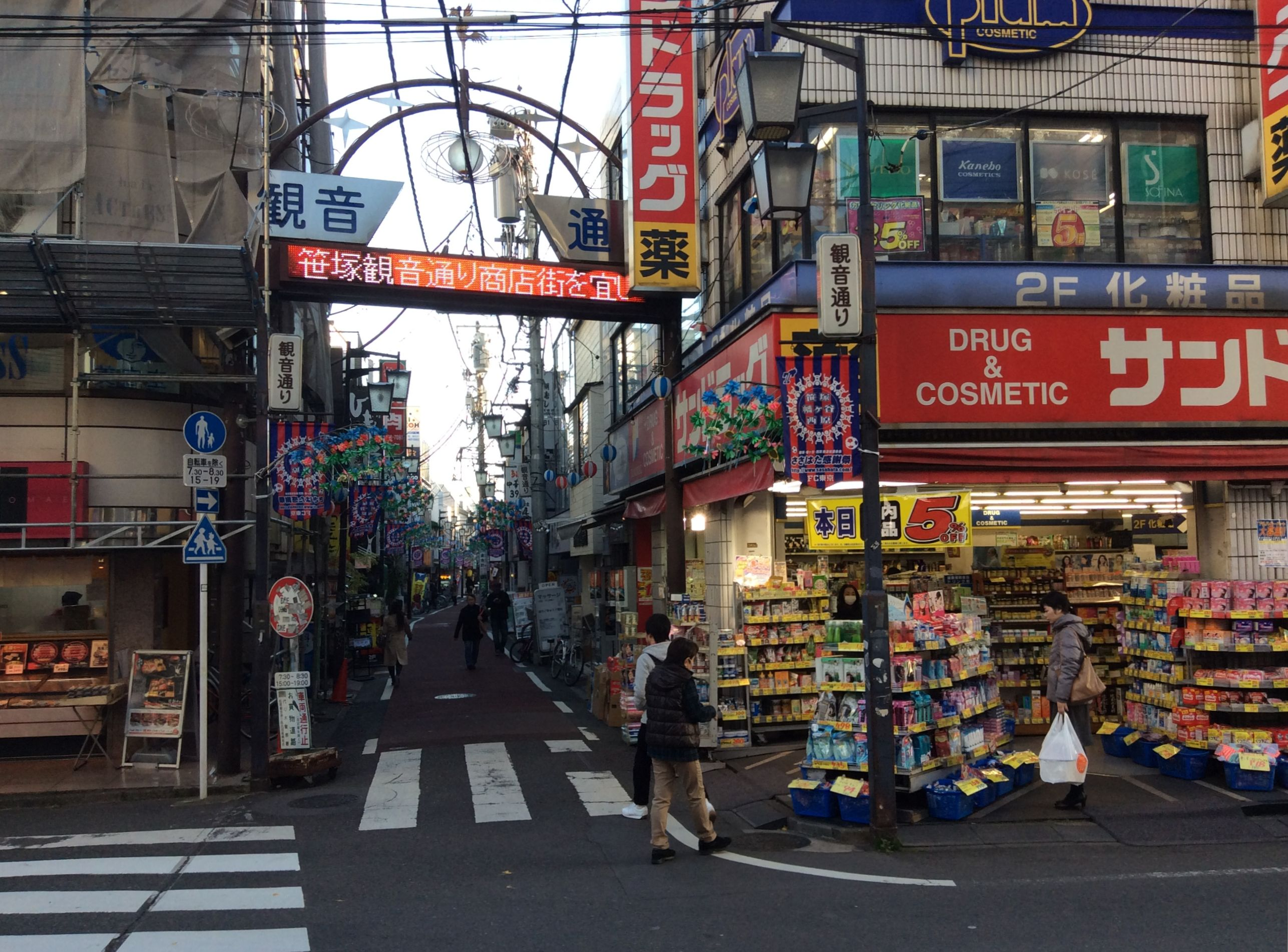 2014年（平成26年）12月7日、笹塚1丁目、笹塚観音通り商店街